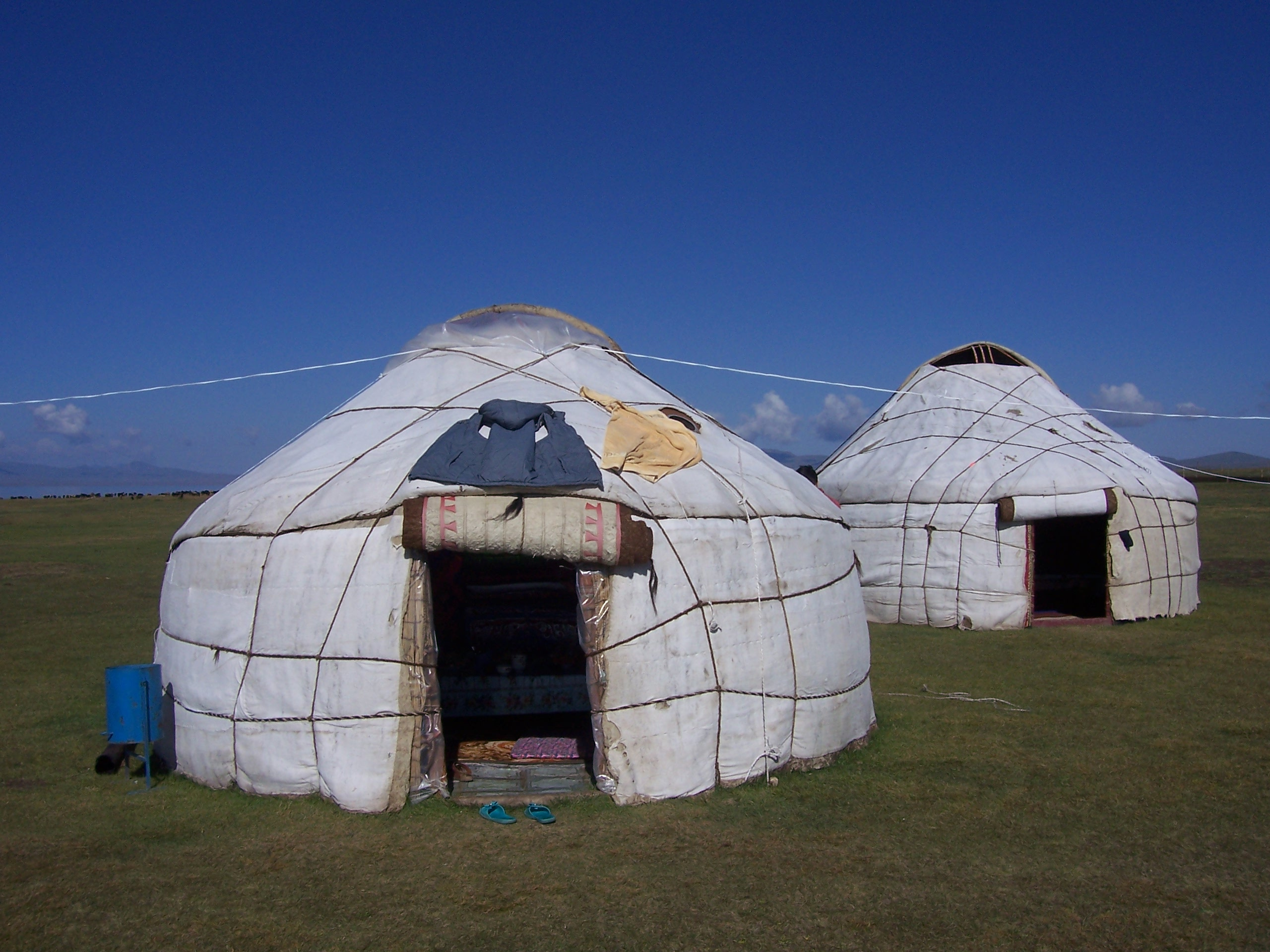 Yourtes kirghizes au bord du lac Song-Kul